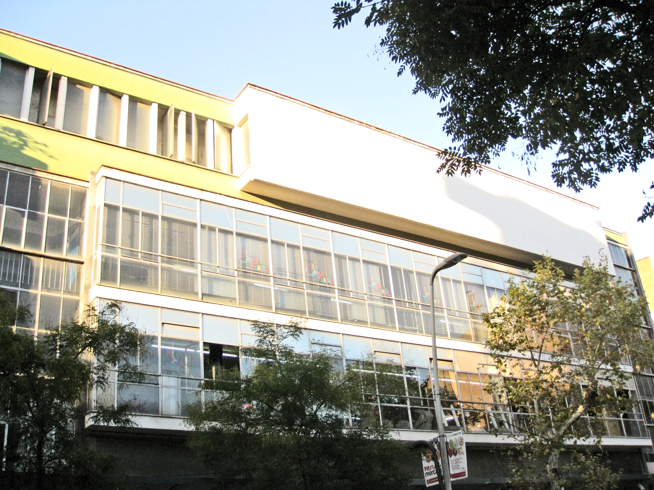 Antic Cinema Liceu, obra neoracionalista d'Antoni de Moragas i Gallissà (1957-59), amb una gran vidriera com a façana principal. Situat al carrer de Sants, núm. 88-96 (Barcelona), avui dia l'edifici ja no és un cinema i es dedica a usos comercials. Detall de la façana de vidre.